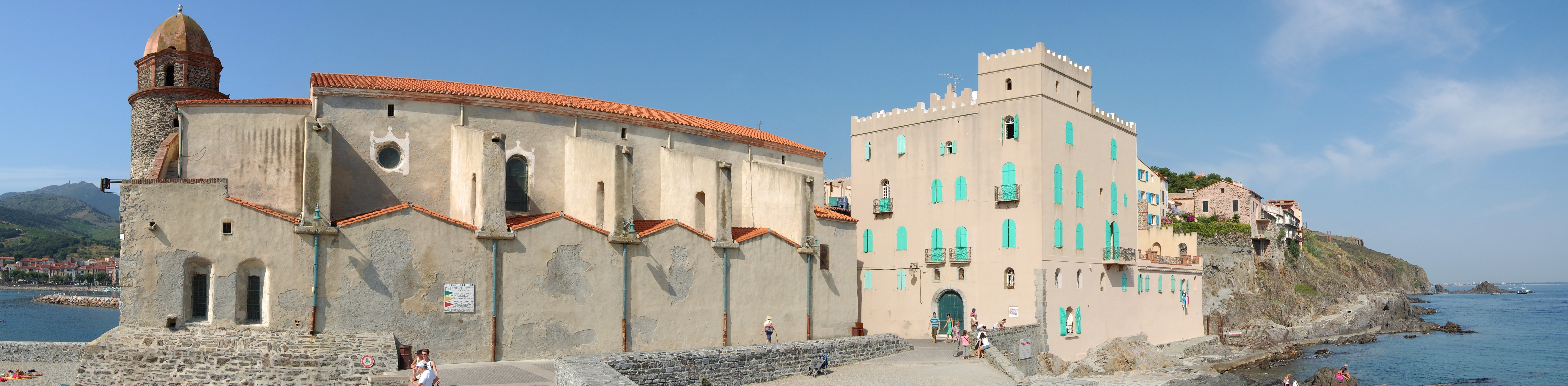 Vue panoramique de l'Église Notre-Dame des Anges à Collioure. Travail personnel, sous licence CC-BY-SA-3.0. Appareil photo utilisé : Nikon D40